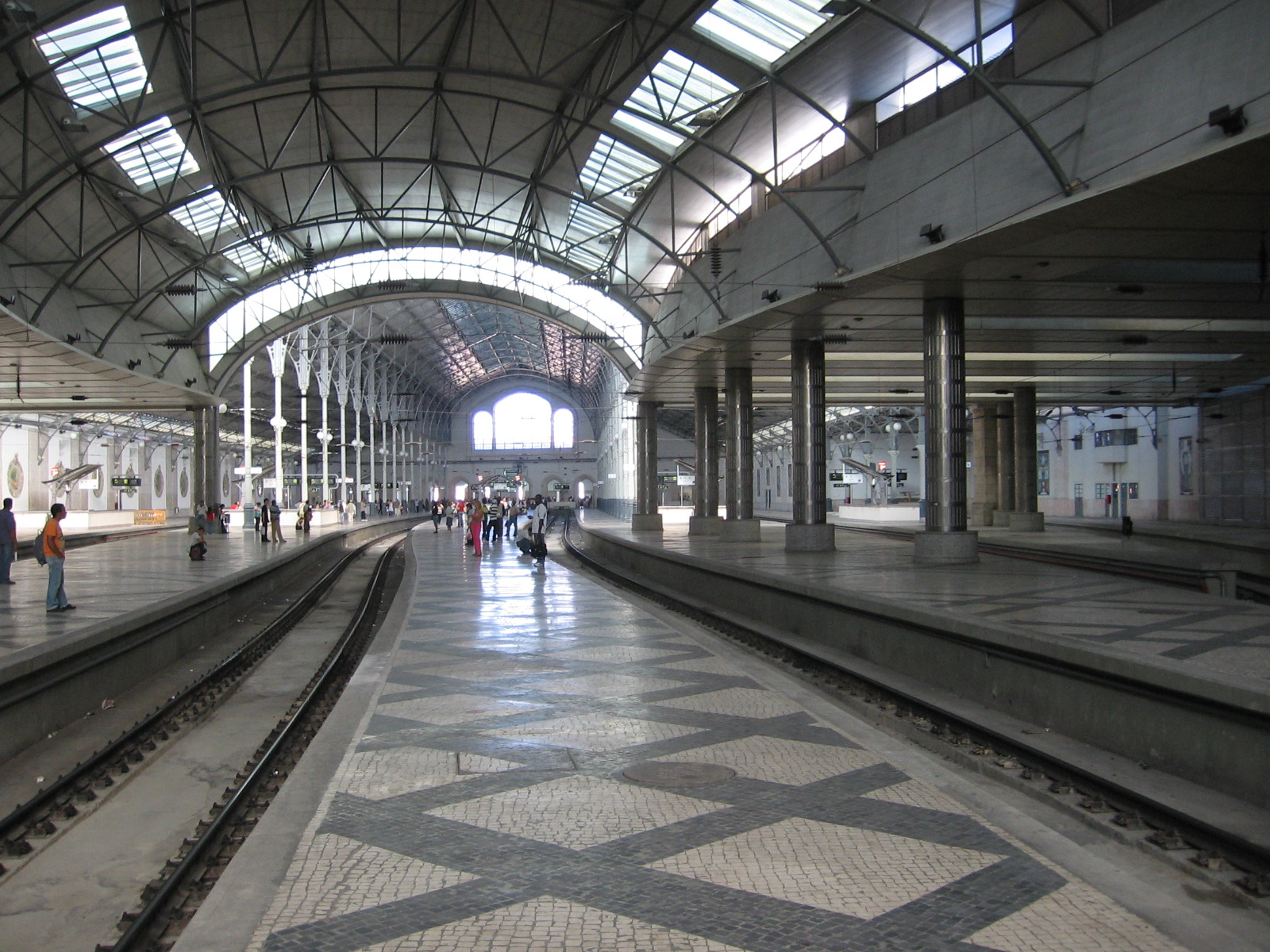 Estação do Rossio, Lisboa, Portugal